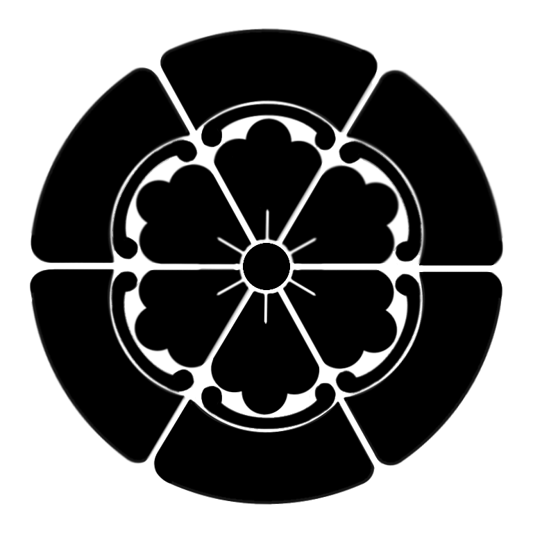 六葉木瓜。小野寺氏などの家紋。